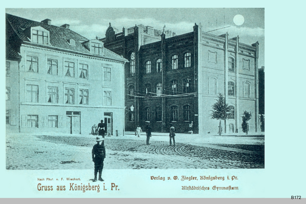 Königsberg